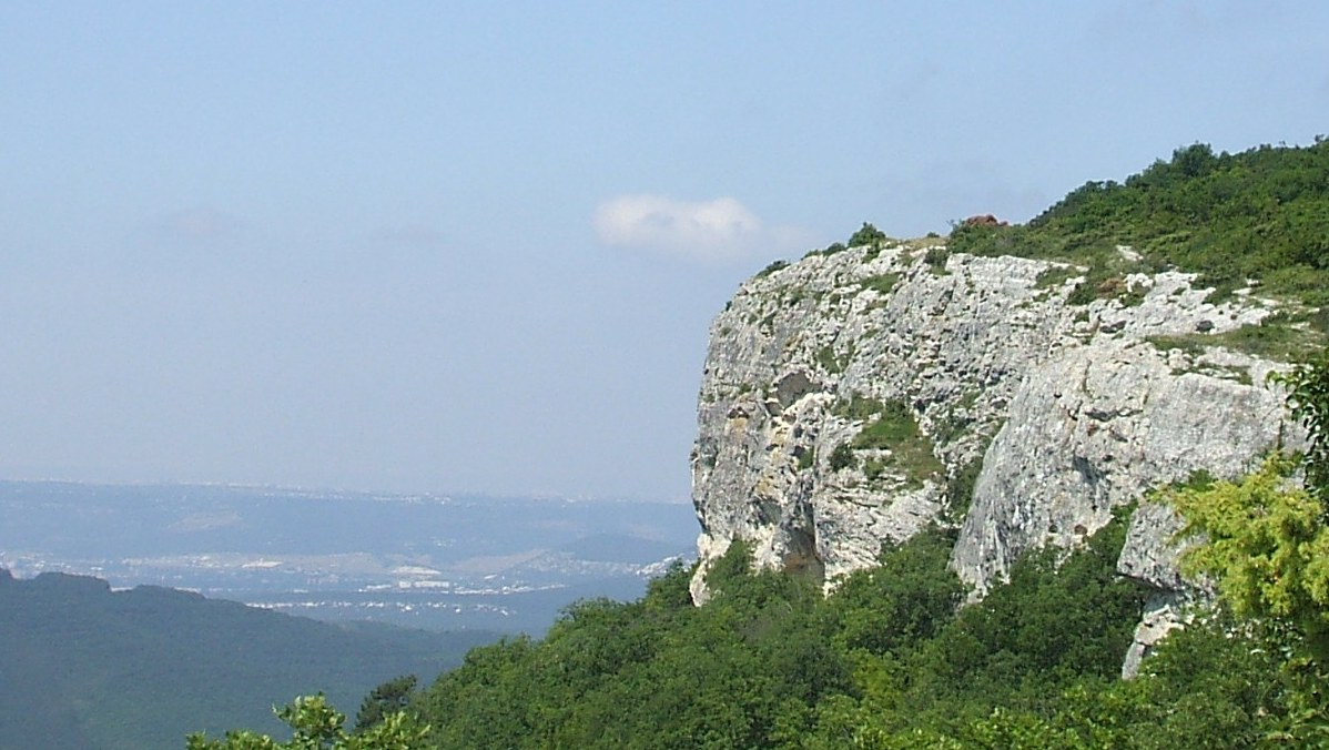 Челтер Мармара вид со стороны Шулдана, в далеке виден Севастополь